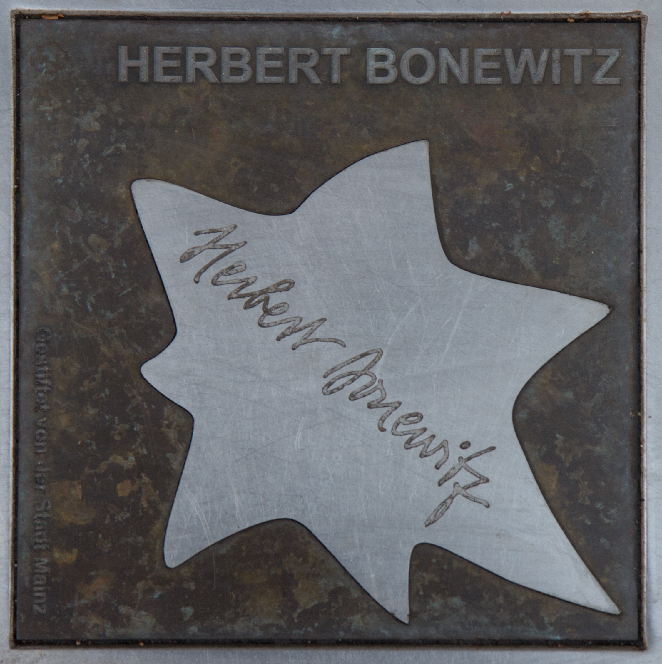 Sterne der Satire - Walk of Fame des Kabaretts in Mainz. Stern Nr. 43 von Herbert Bonewitz.